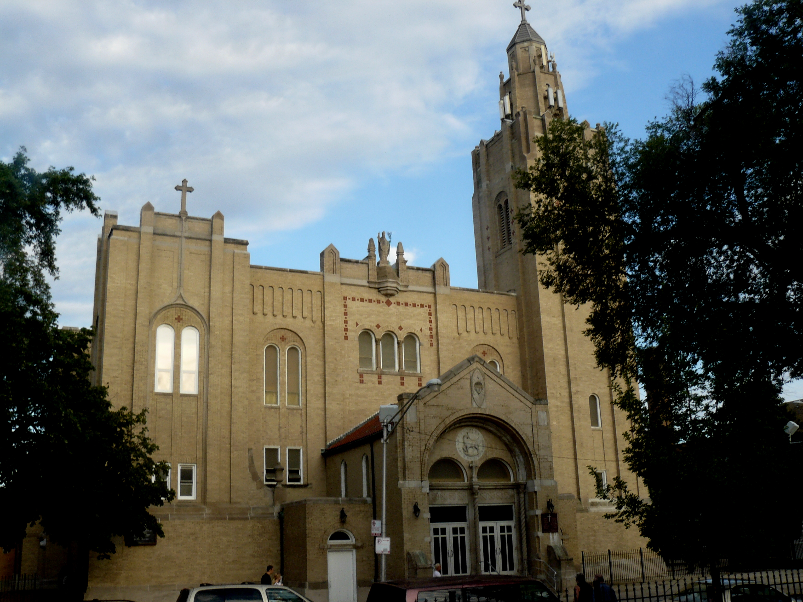 St. Stanislaus Bishop and Martyr Parish - Parafia św. Stanisława Biskupa i Męczennika w Chicago